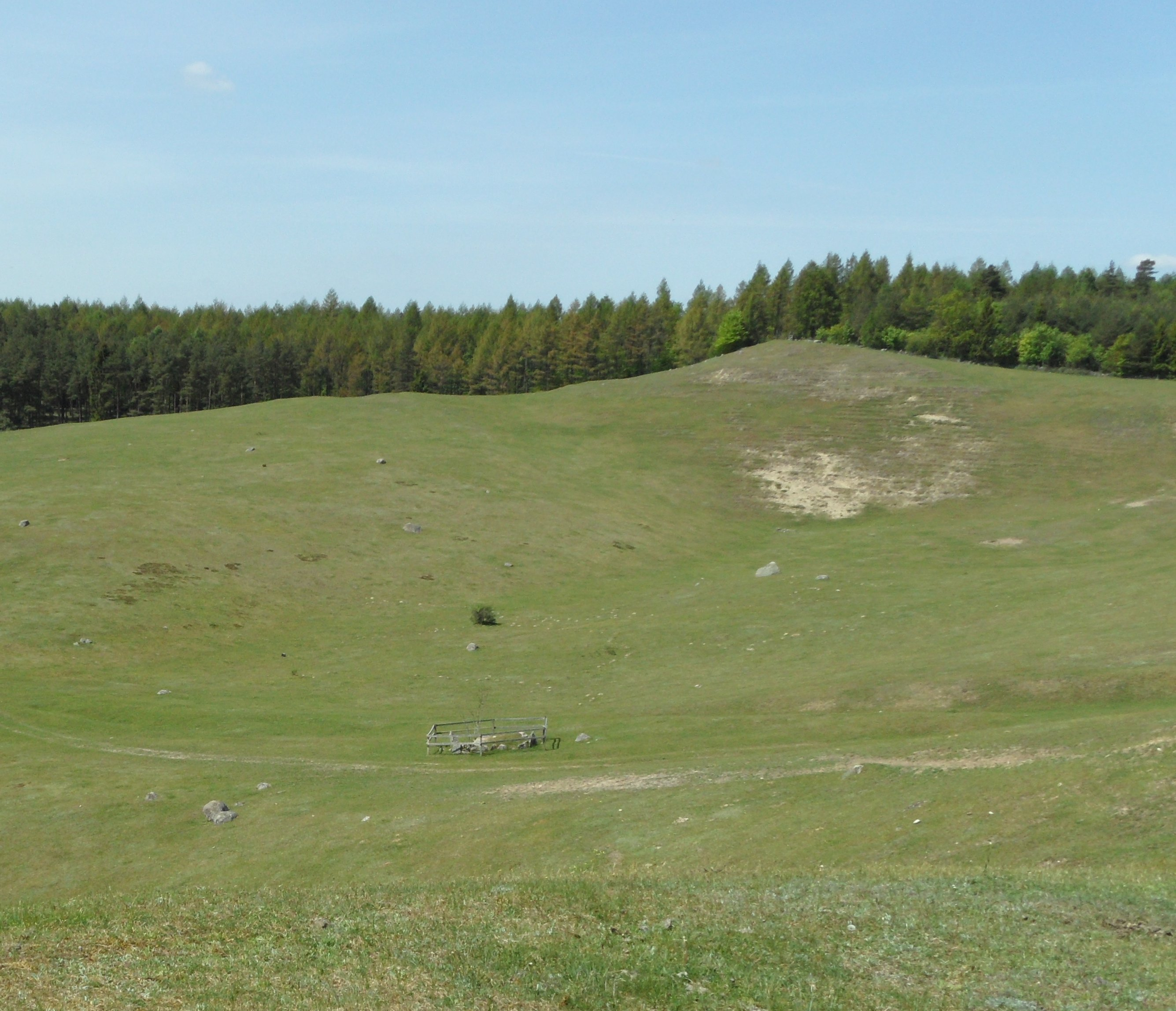 Kumlans naturreservat sandstäppsvegetation